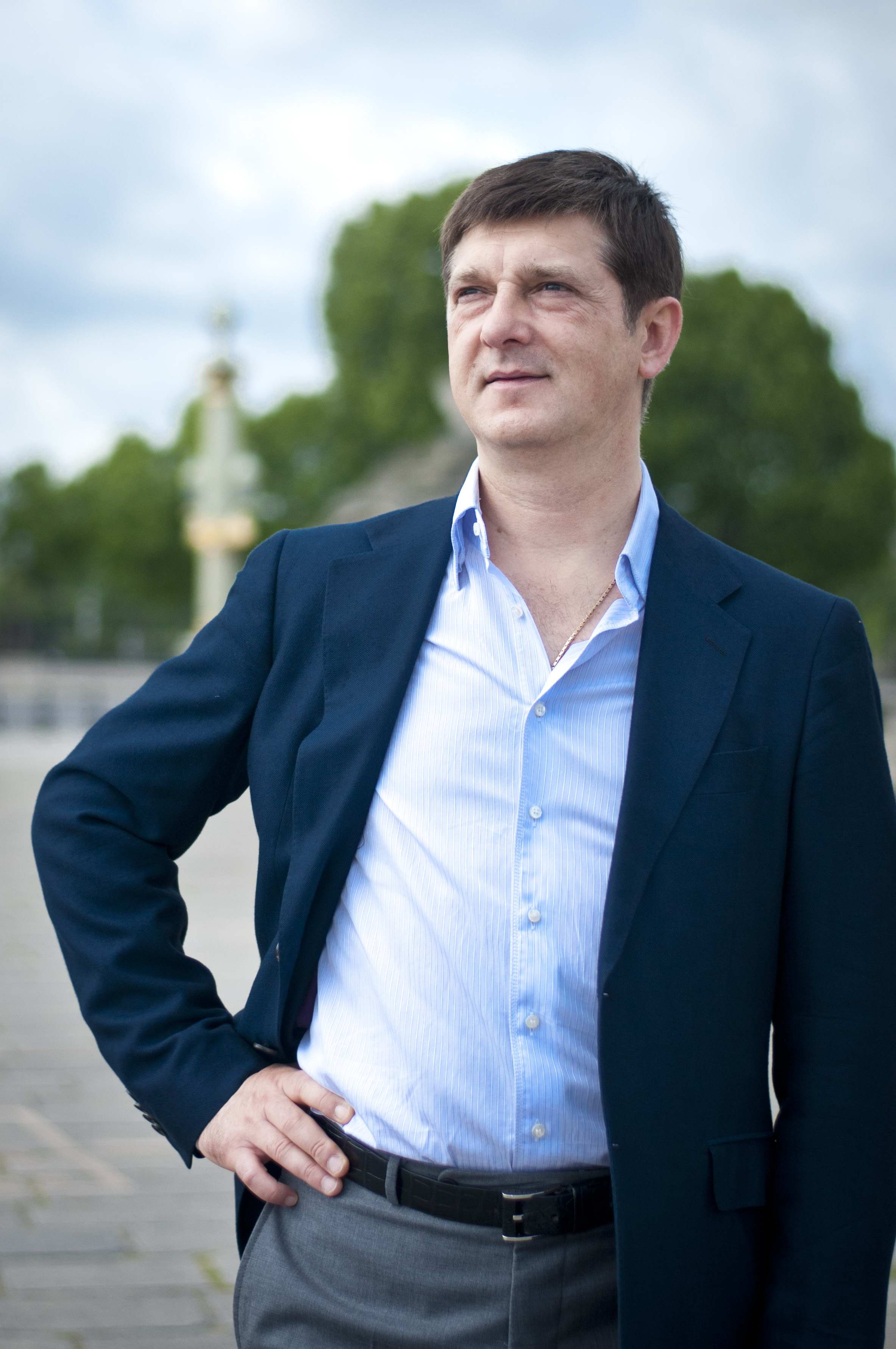 Дмитрий Кузьмин смотрит в светлое будущее вместе с общеевропейской партией ЛЮБОВЬ, Париж, Франция.